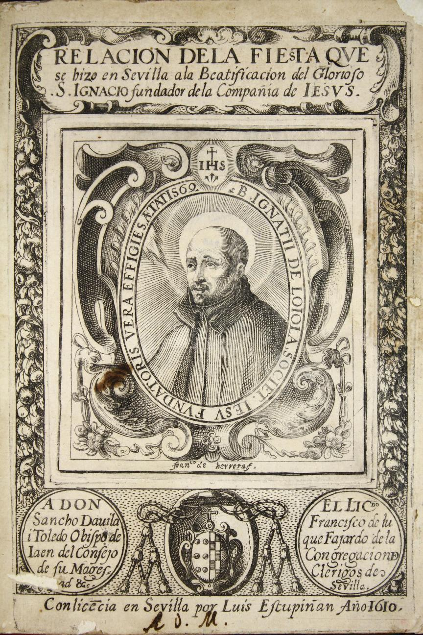 Portada calcográfica de Francisco Luque Fajardo, Relacion de la fiesta que se hizo en Sevilla a la beatificacion del glorioso S. Ignacio fundador de la Compañia de Iesus, En Sevilla, por Luis Estupiñán, 1610. Grabado firmado fran.co de herrerar f. Ejemplar de la Biblioteca de la Universidad de Sevilla